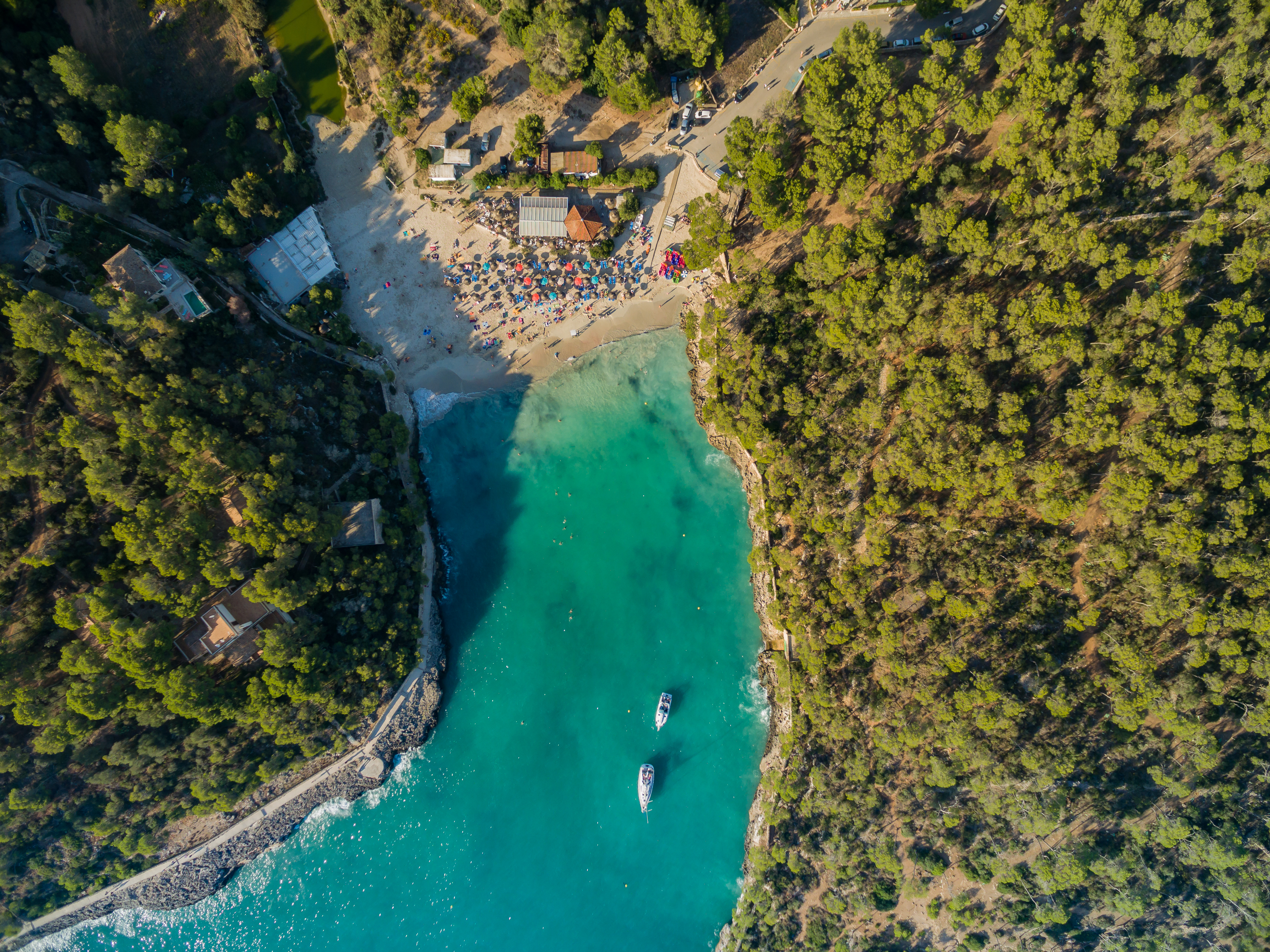 Mallorca schönste Strände Cala Mondrago